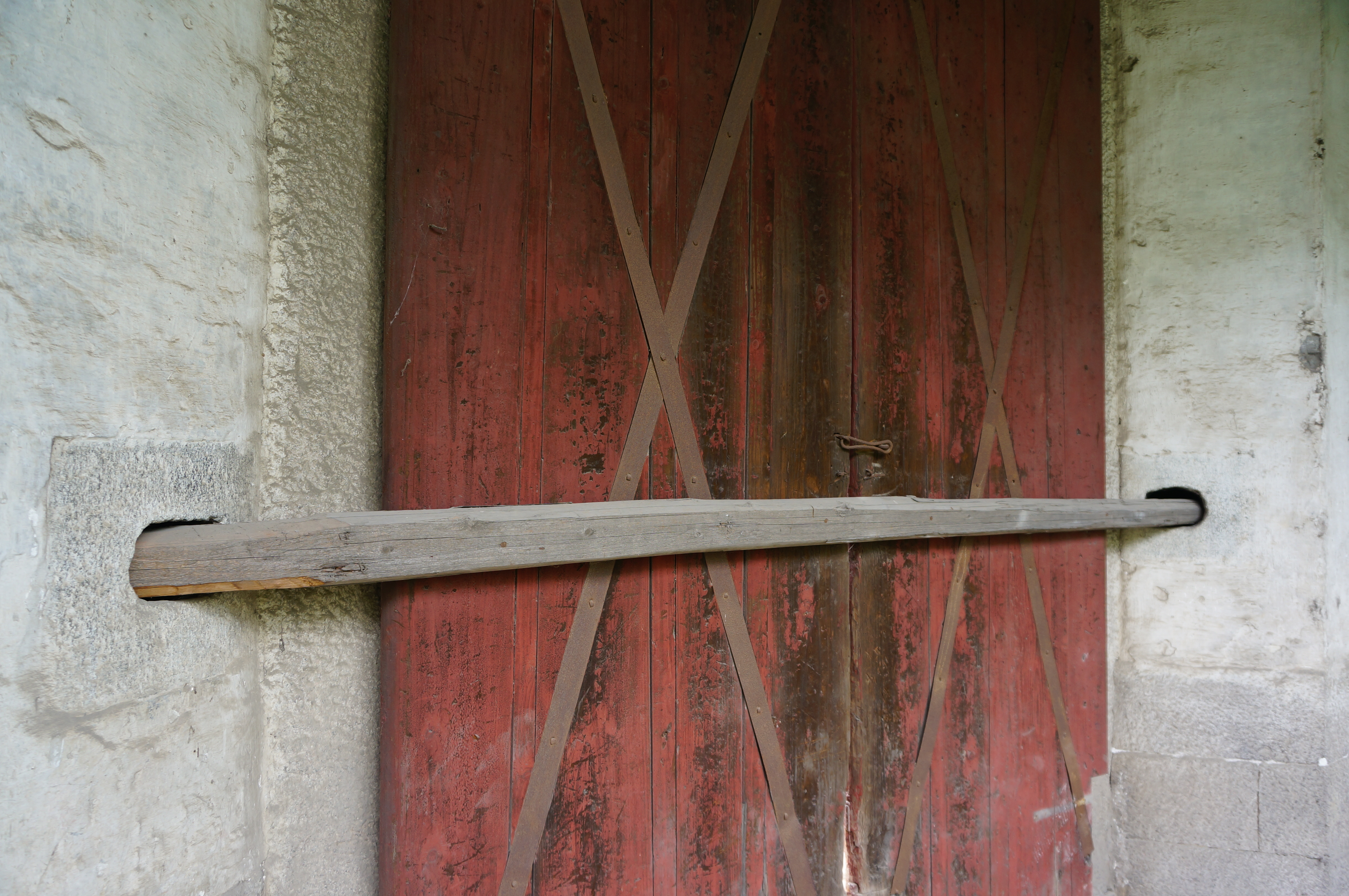 桐乡濮院镇翔云观山门，中门内侧门闩。